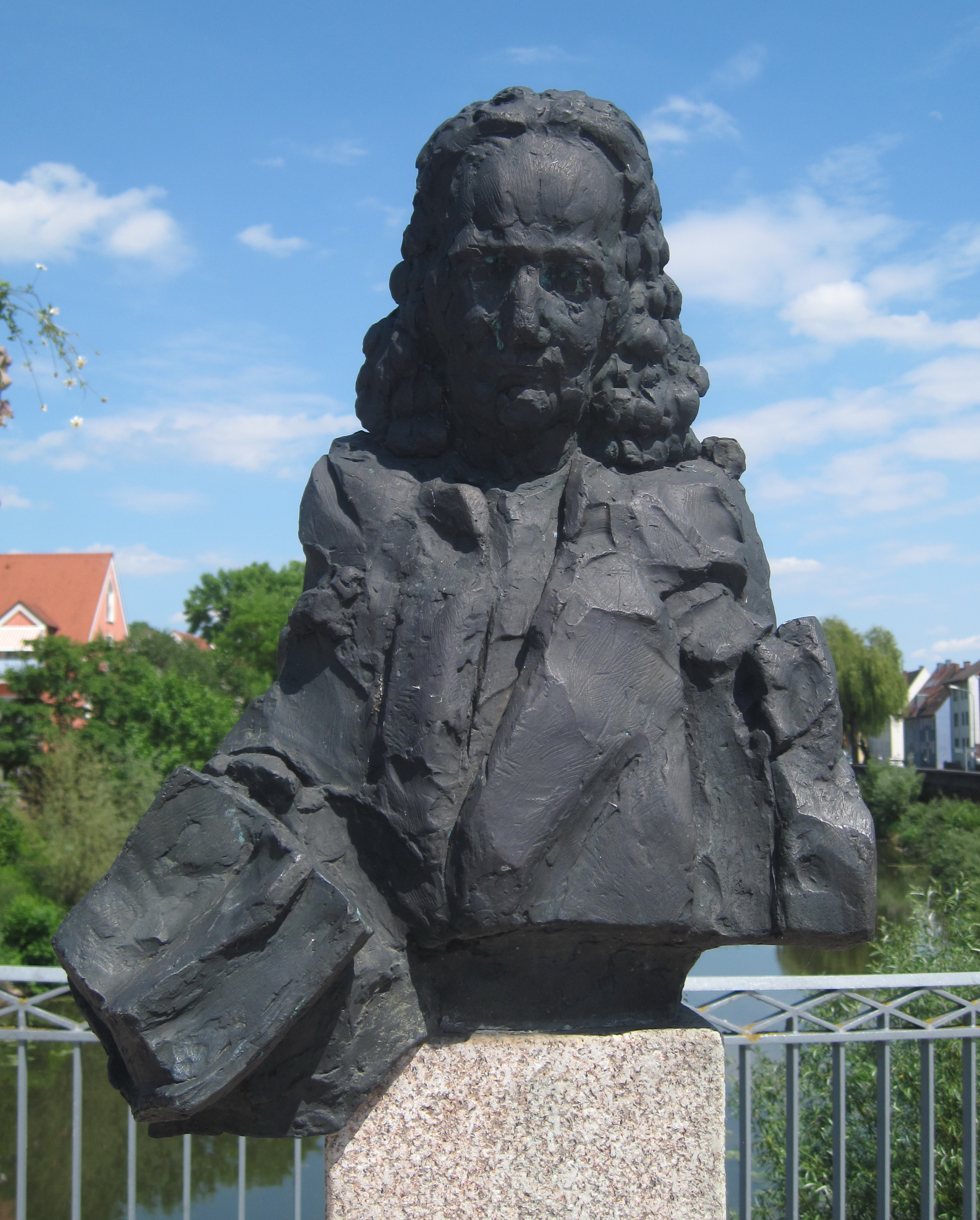 Skulptur Sebastian Franck in Donauwörth auf der Sebastian-Franck-Brücke über die Wörnitz